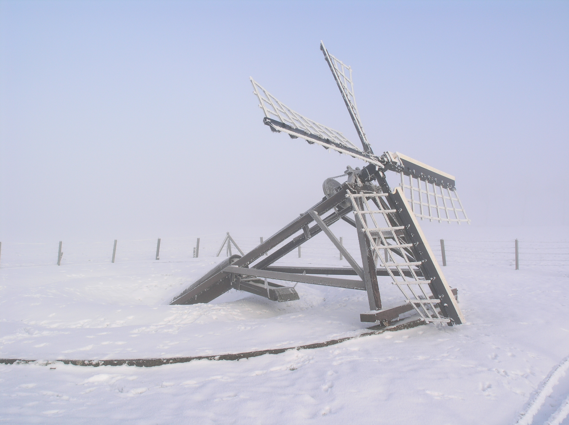 Augustinusga Boktjasker Winter